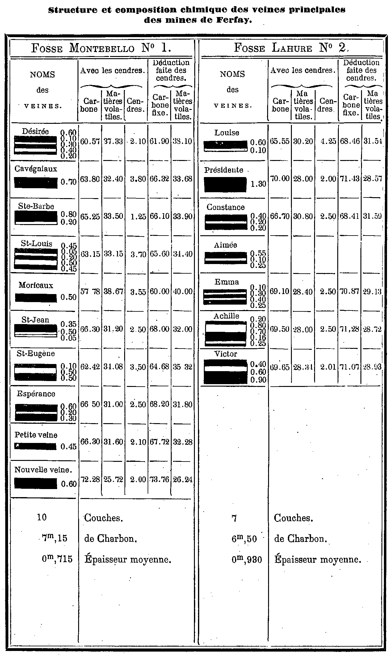 Veines recoupées aux fosses n° 1 et 2 de la Compagnie des mines de Ferfay.